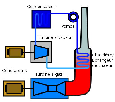 Description d un cycle combiné